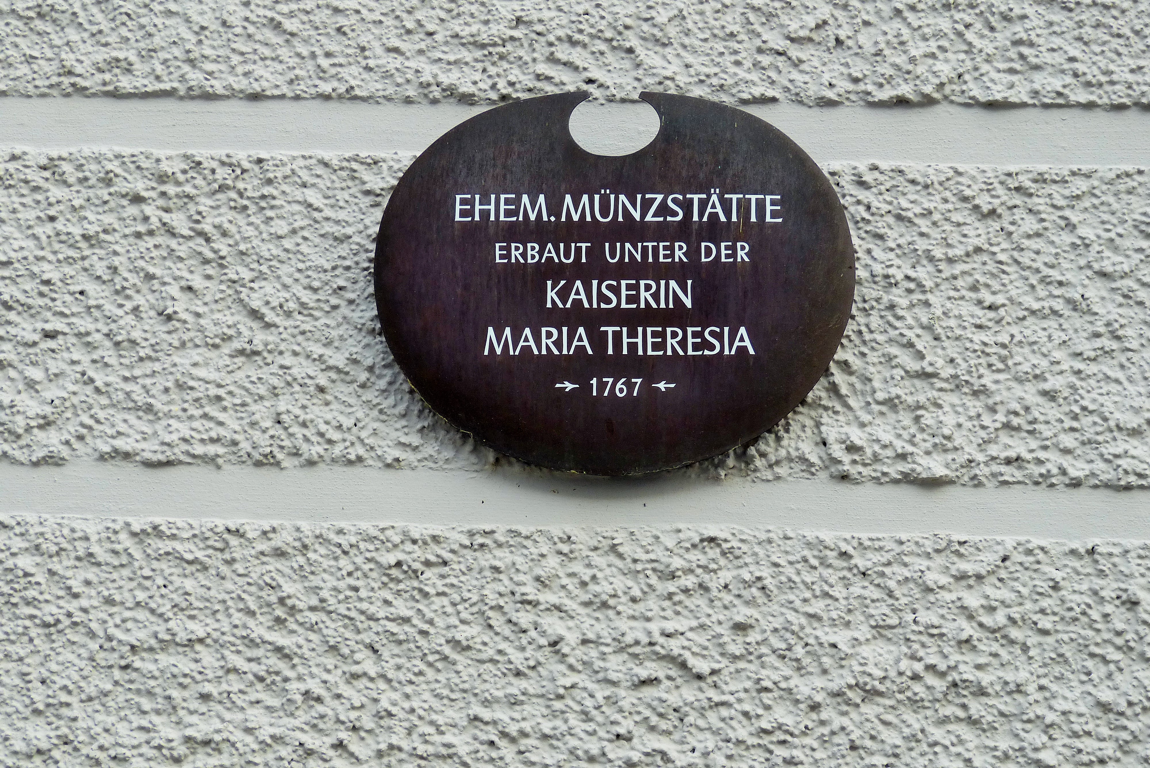 Münze, 2019